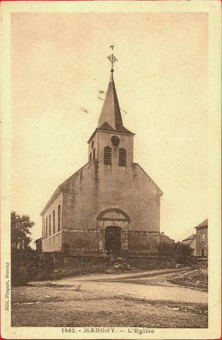 Margny (Ardennes ; France) ; église avant 1914